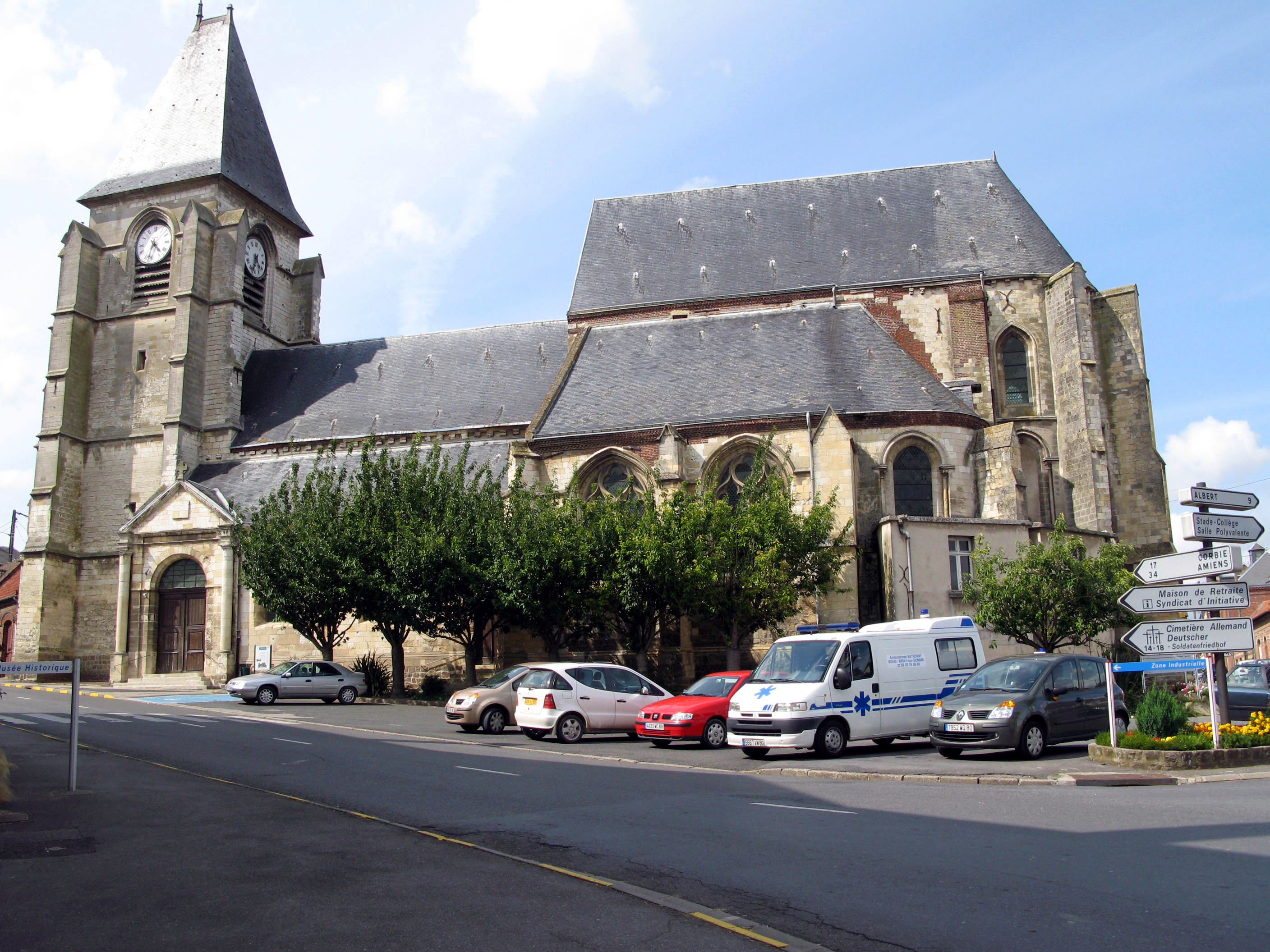 Bray-sur-Somme (Somme, France) - L'église St-Nicolas, vue depuis l'angle de l'Hôtel-de-ville.